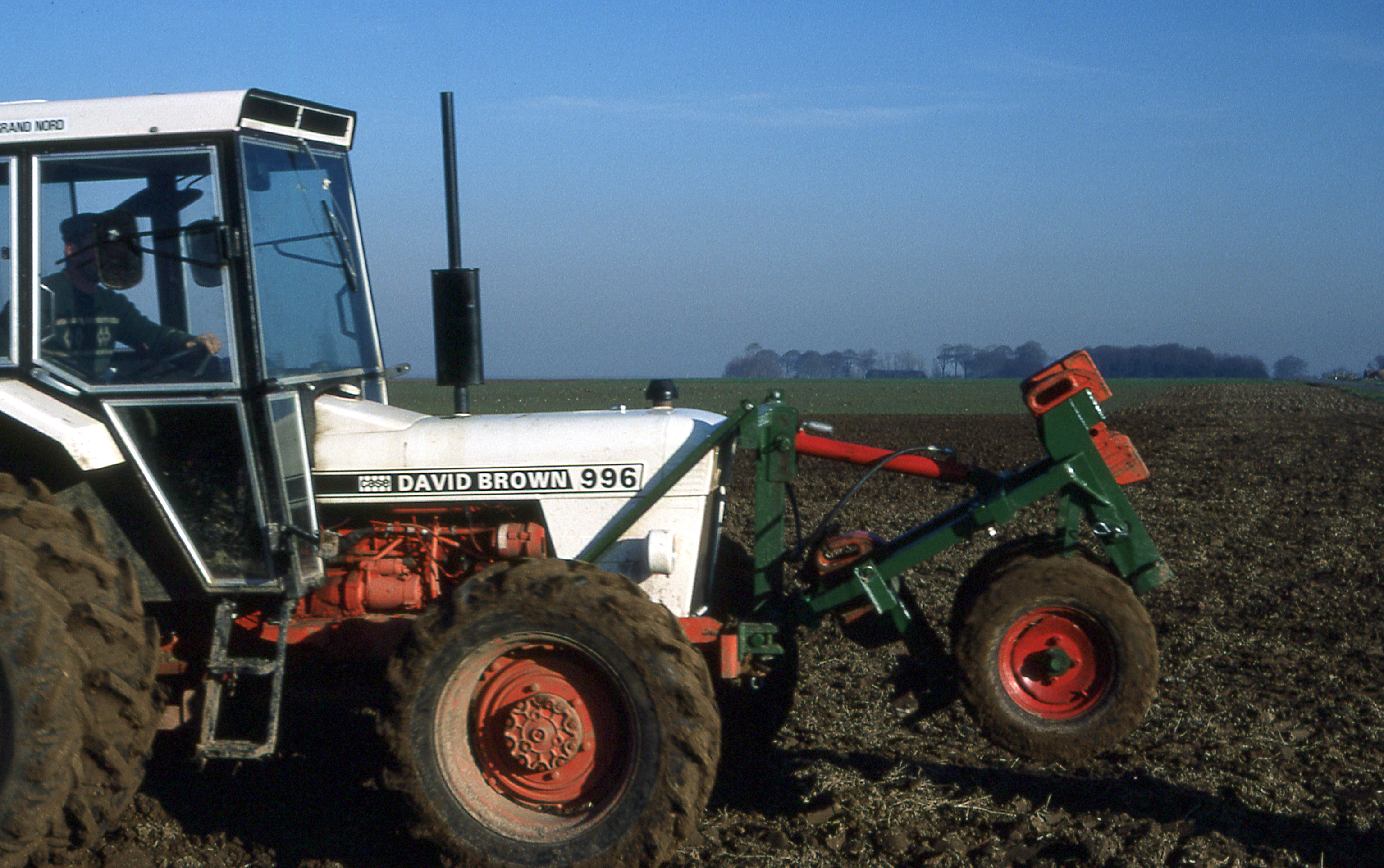 Outil de tassage du sol labouré pour compléter celui effectué par les roues du tracteur.